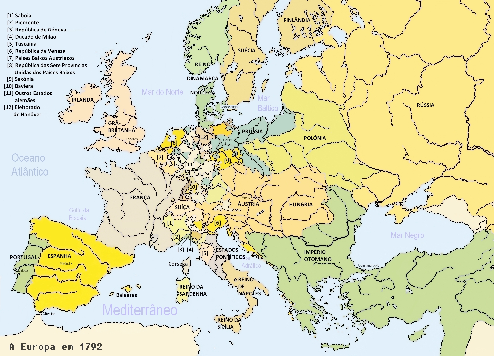 Mapa político da Europa em 1792